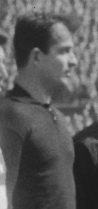 Turgay Şeren